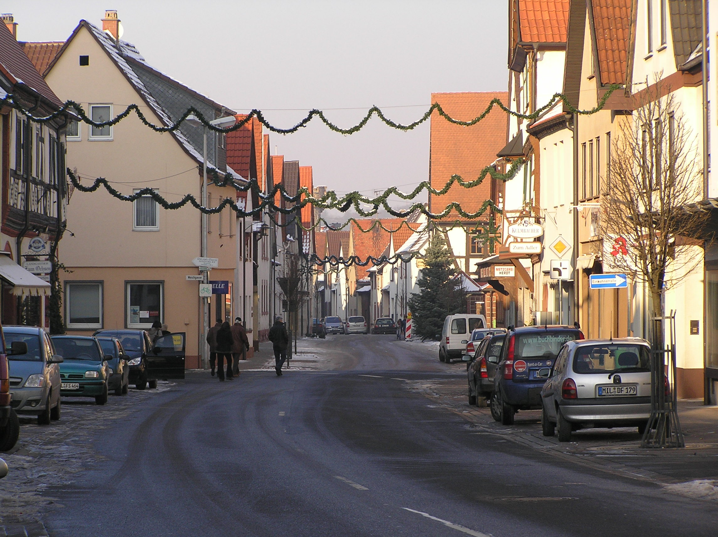 Die Hauptstraße in Großwallstadt